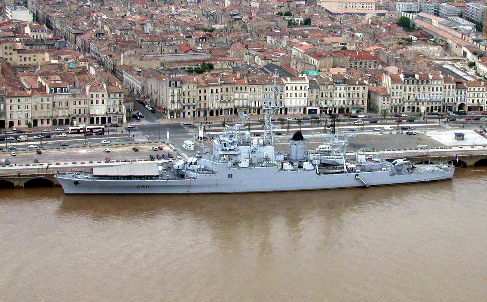 Croiseur Colbert dans le port de Bordeaux